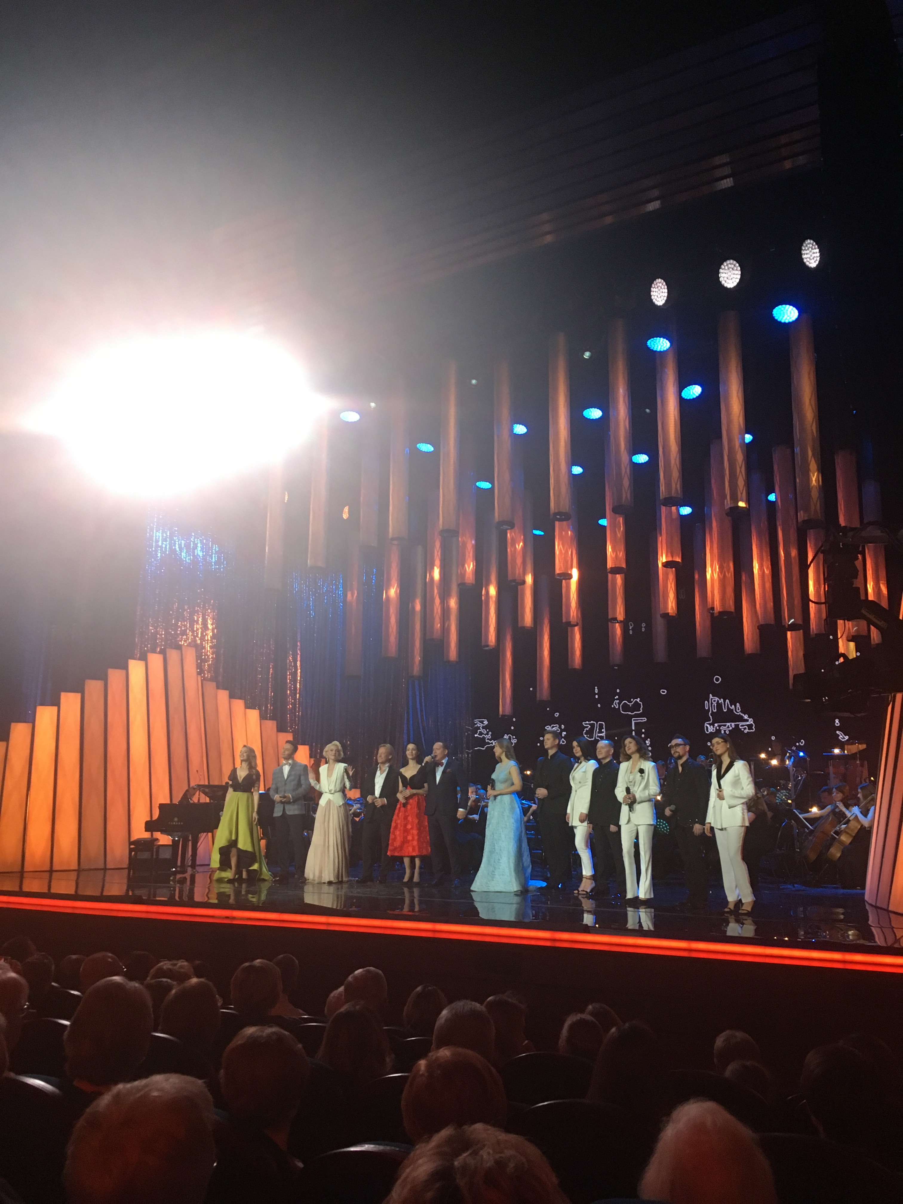 Запись концерта "Мистер Совершенство!" встреча с Максимом Дунаевским (к 75-летию композитора). Проект "Романтика Романса", телеканал "Культура"